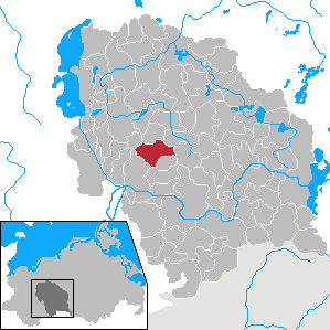 Friedrichsruhe in Mecklenburg-Vorpommern - District Parchim